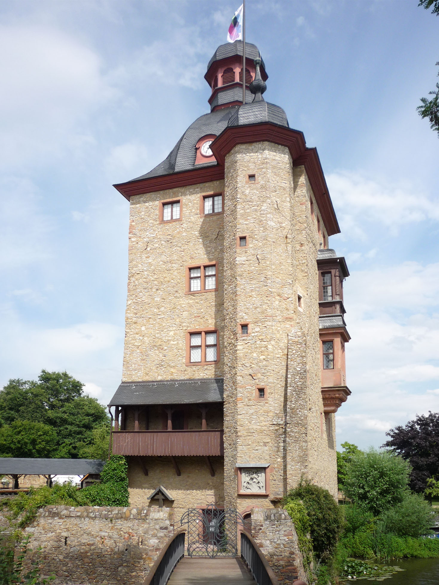 Schloss Vollrads Wohnturm in Ostrich-Winkel, 2 km nördlich des Ortsteils Winkel